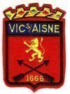 Blason 1ère Compagnie d'Arc de Vic-sur-Aisne